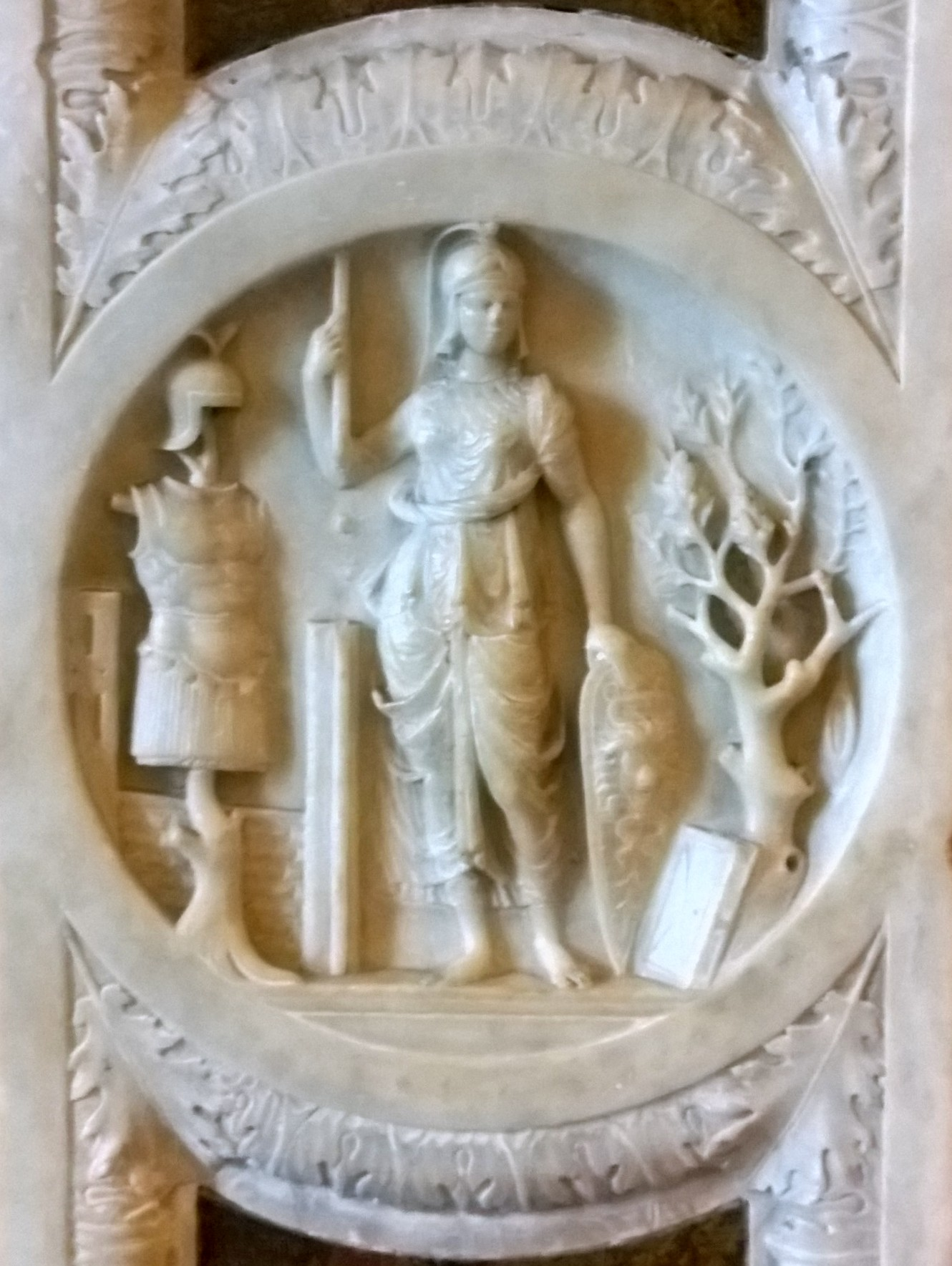 dettaglio dello Studiolo di Isabella d'Este nel Palazzo Ducale di Mantova.